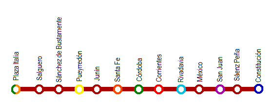 Progetto Linea F